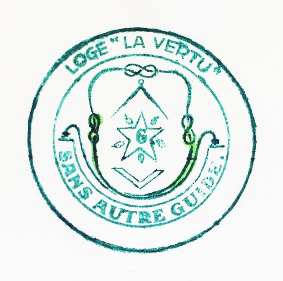 Stempel Loge La Vertu